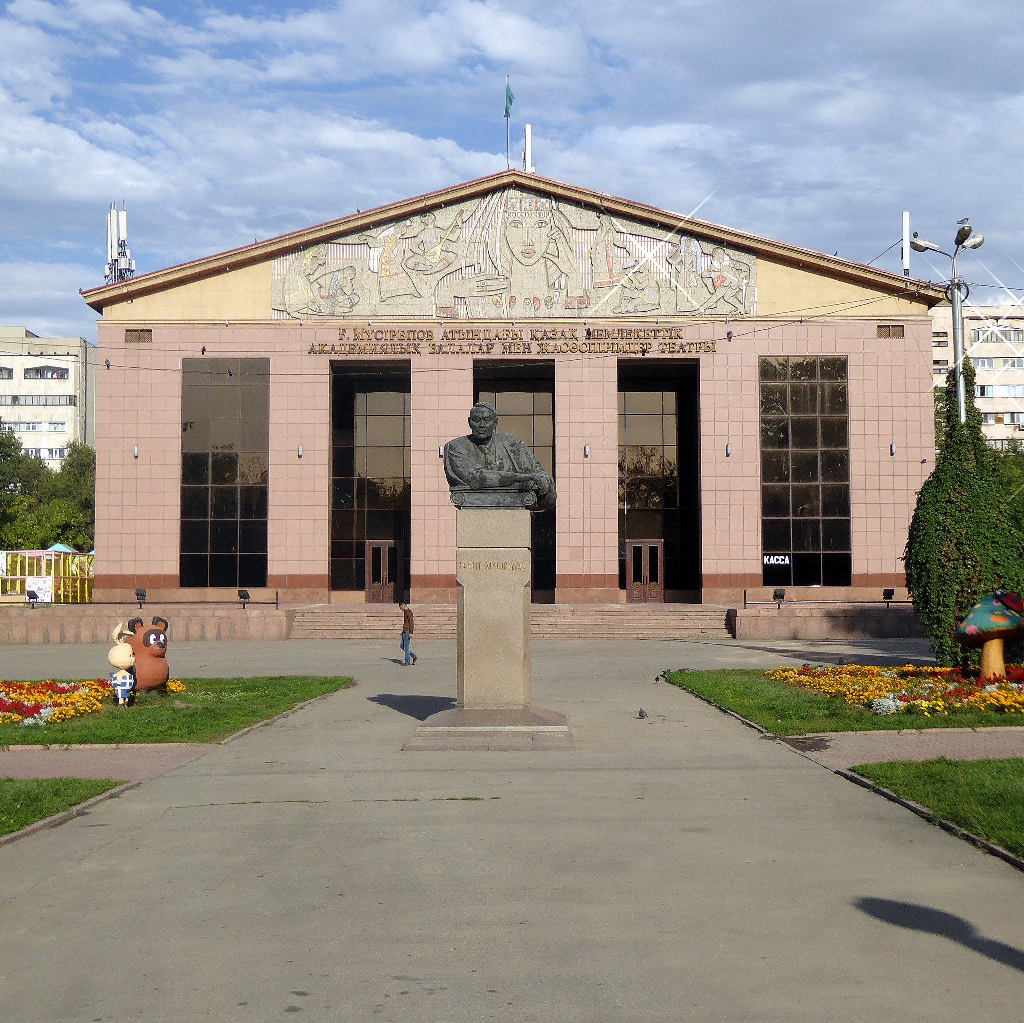 Казахский государственный академический театр для детей и юношества имени Г. Мусрепова (Алматы)